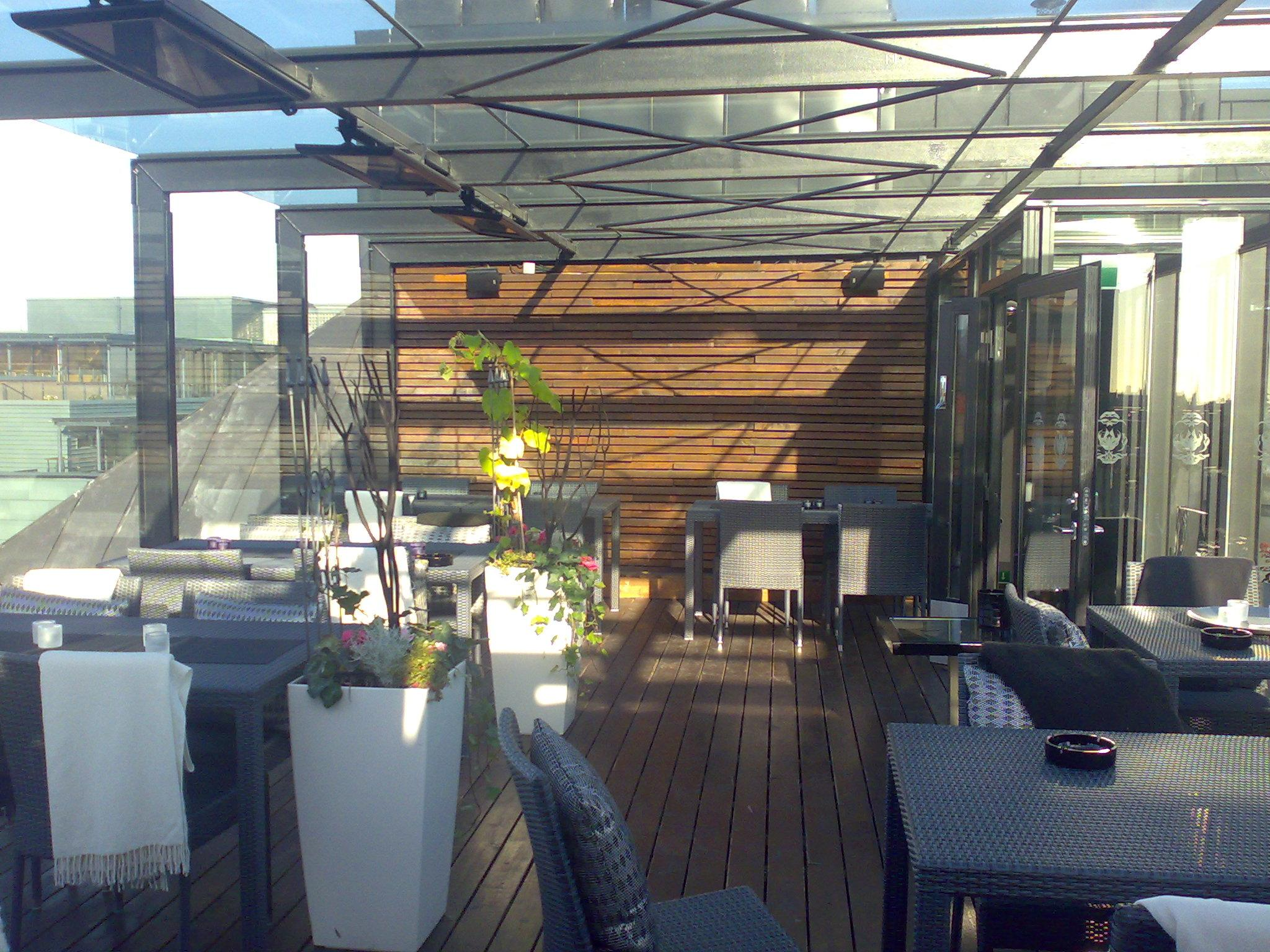 Ravintola Bläkin kattoterassi